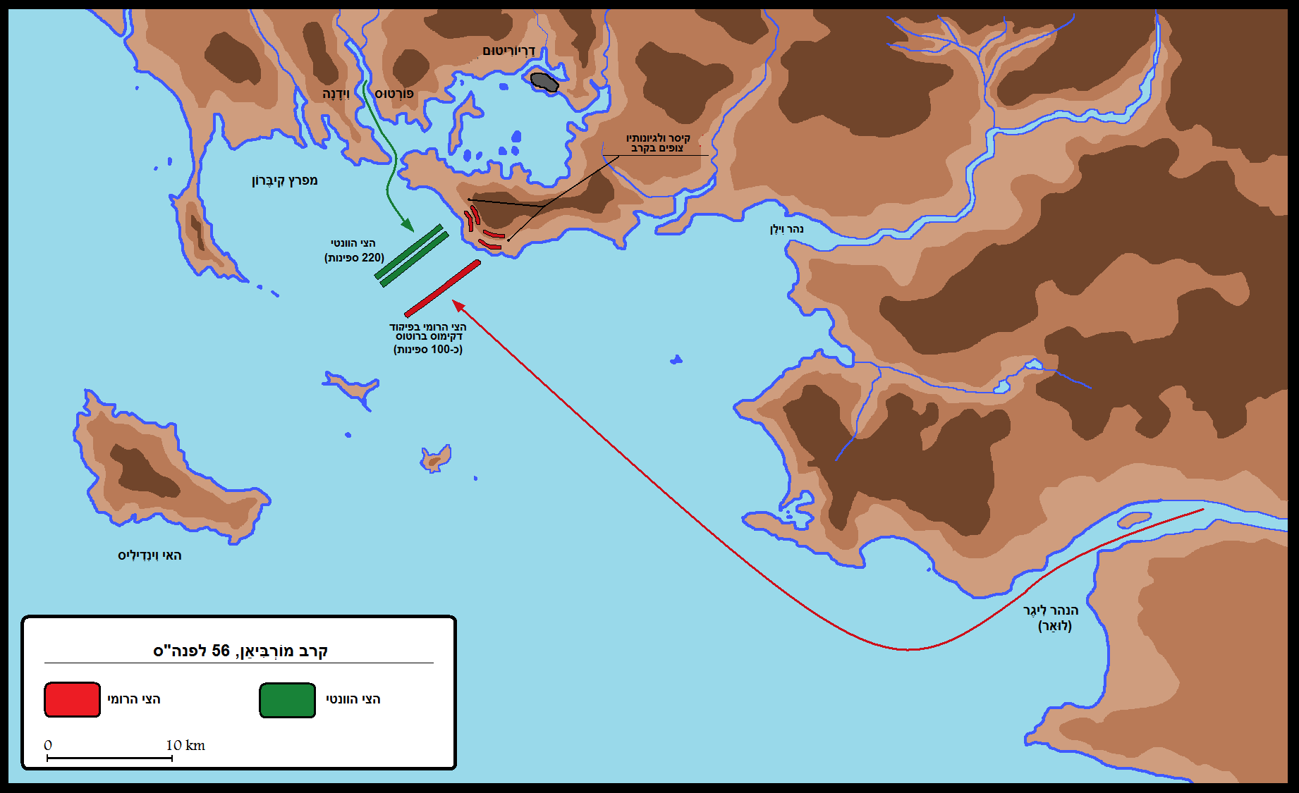 קרב מורביאן, 56 לפנה"ס